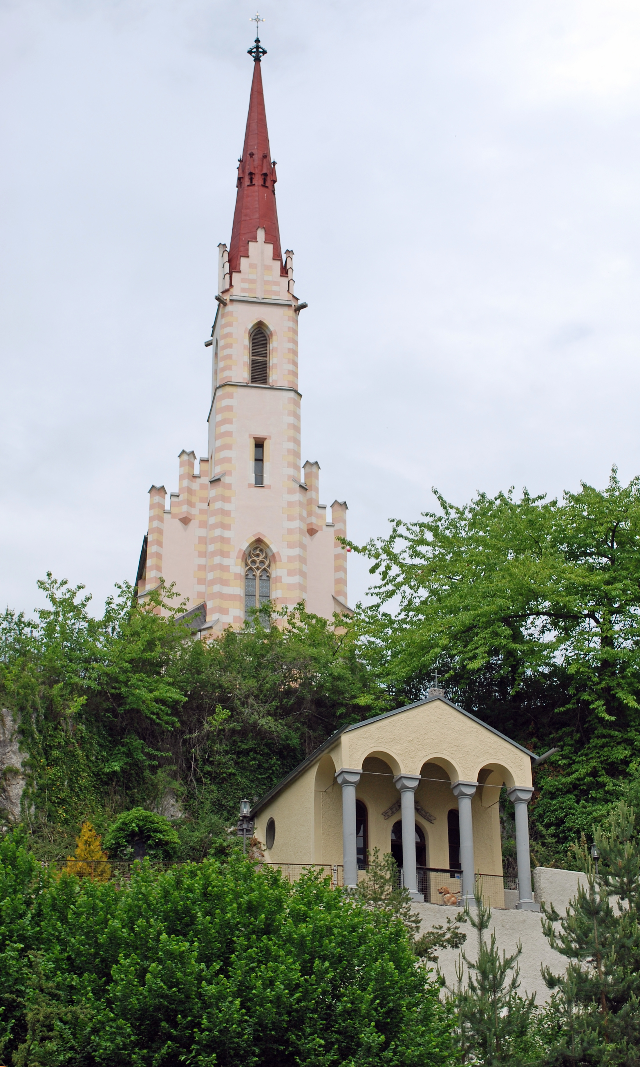 Wallfahrtskirche Maria Hilf am Locherboden und Kirchhof, davor die Ursprungskapelle.